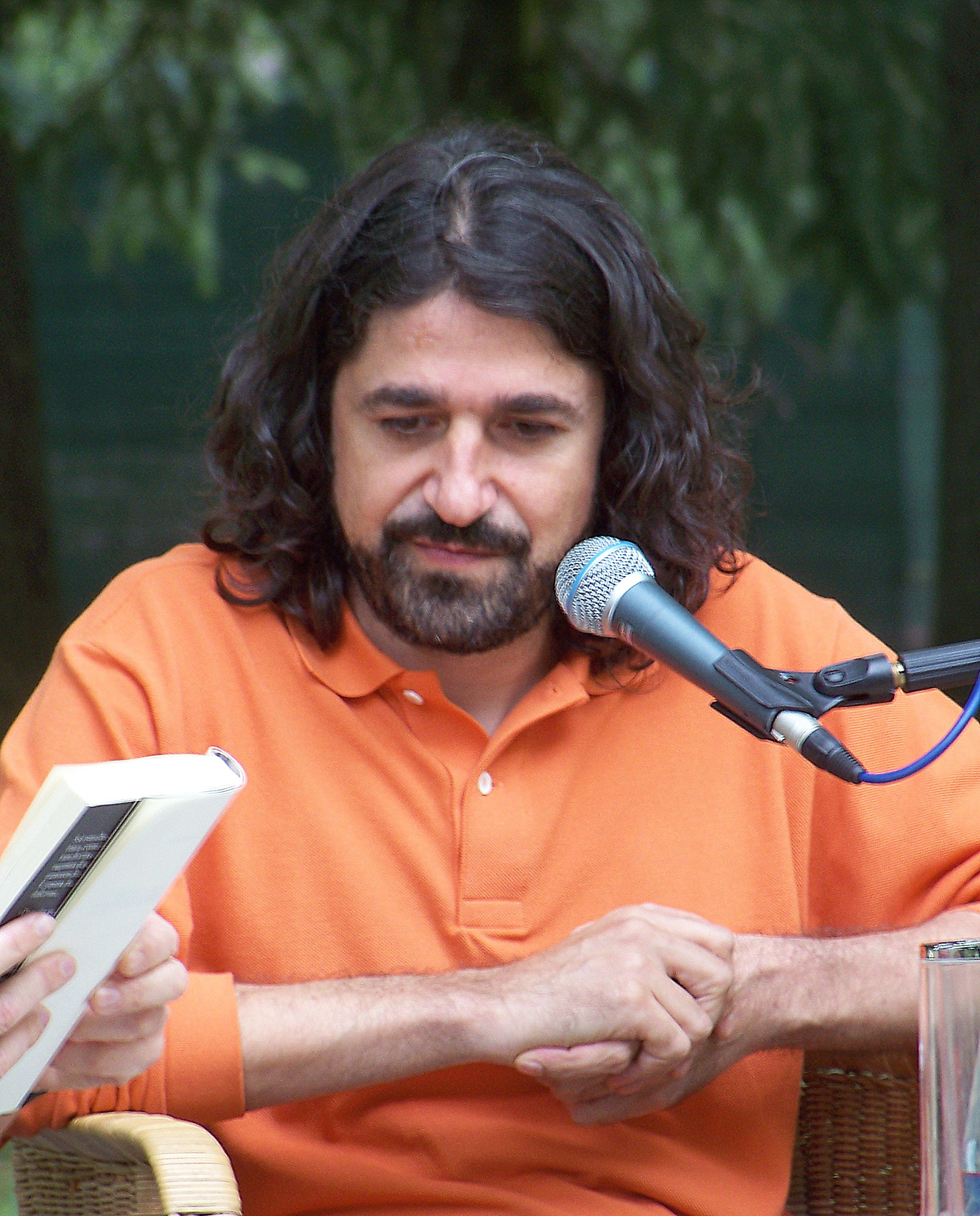 Foto dello scrittore italo - iraniano Hamid Ziarati